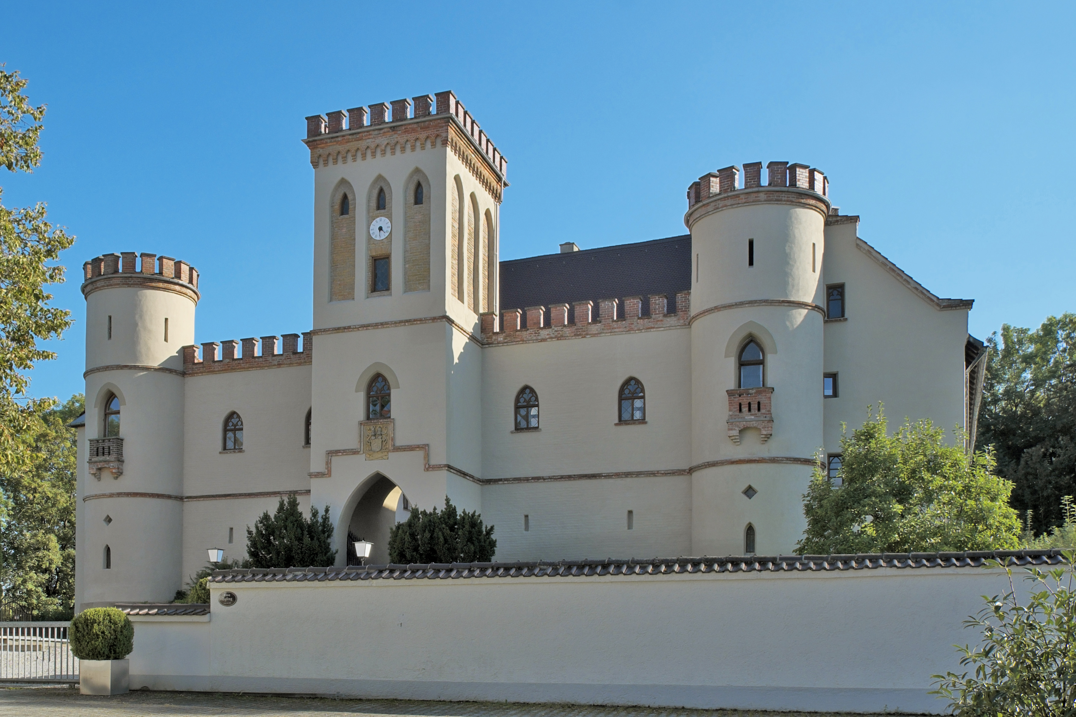 Schloss Igling in Igling im Landkreis Landsberg am Lech (Bayern/Deutschland)